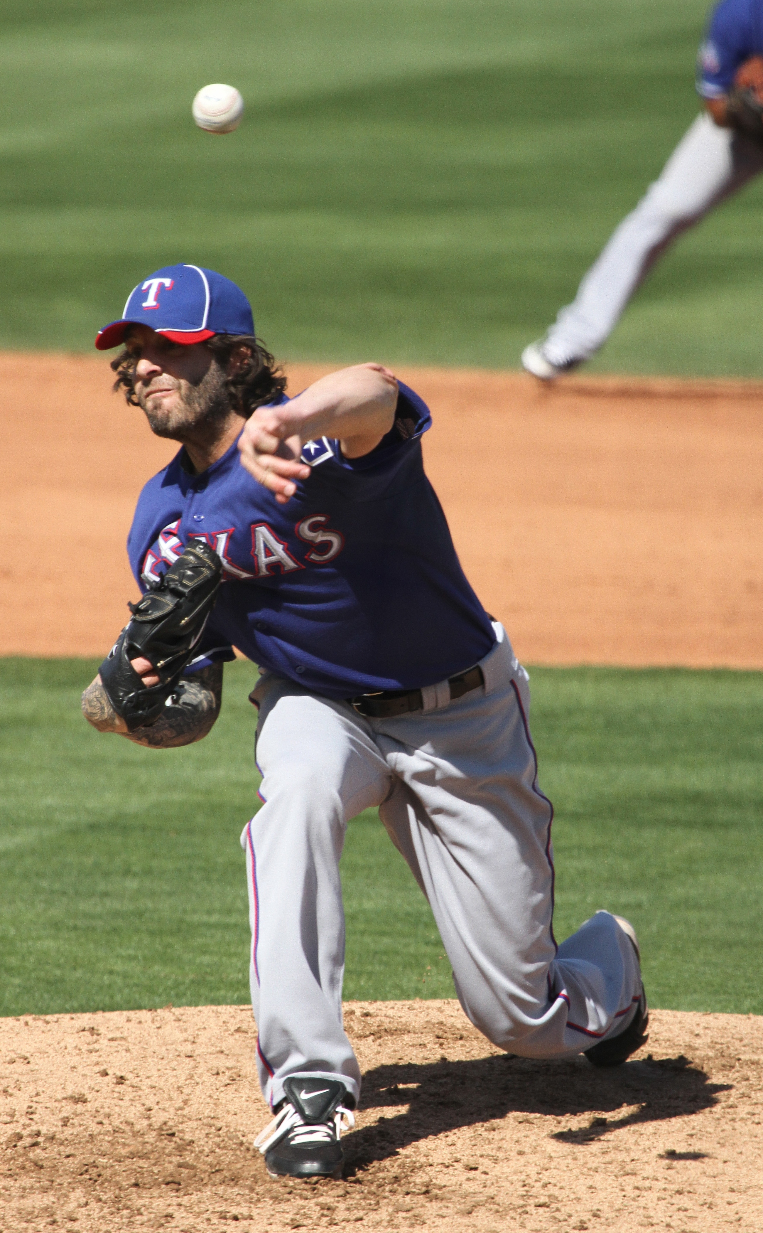 Joe Beimel